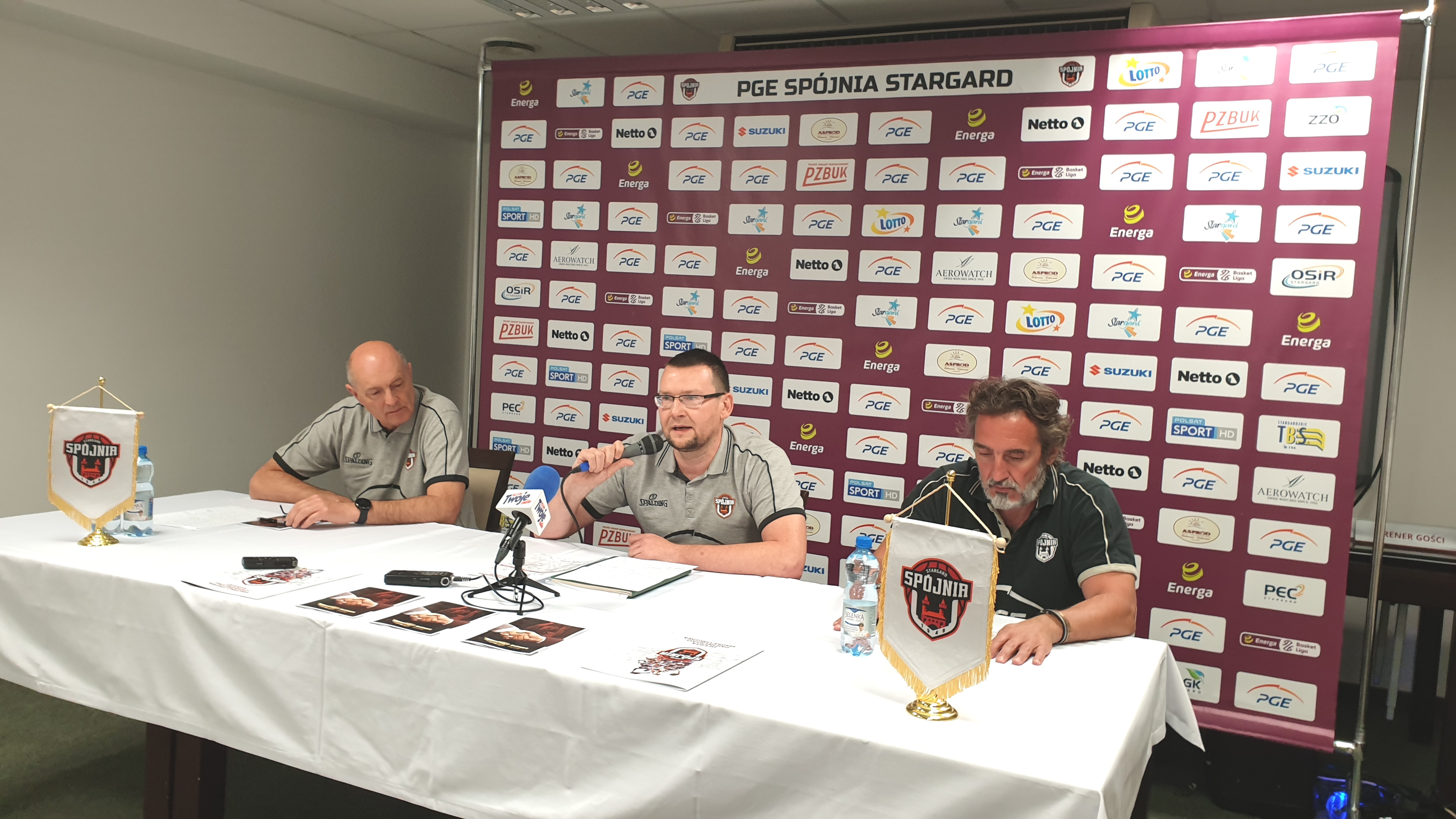 PGE Spójnia Stargard, sezon 2020-2021